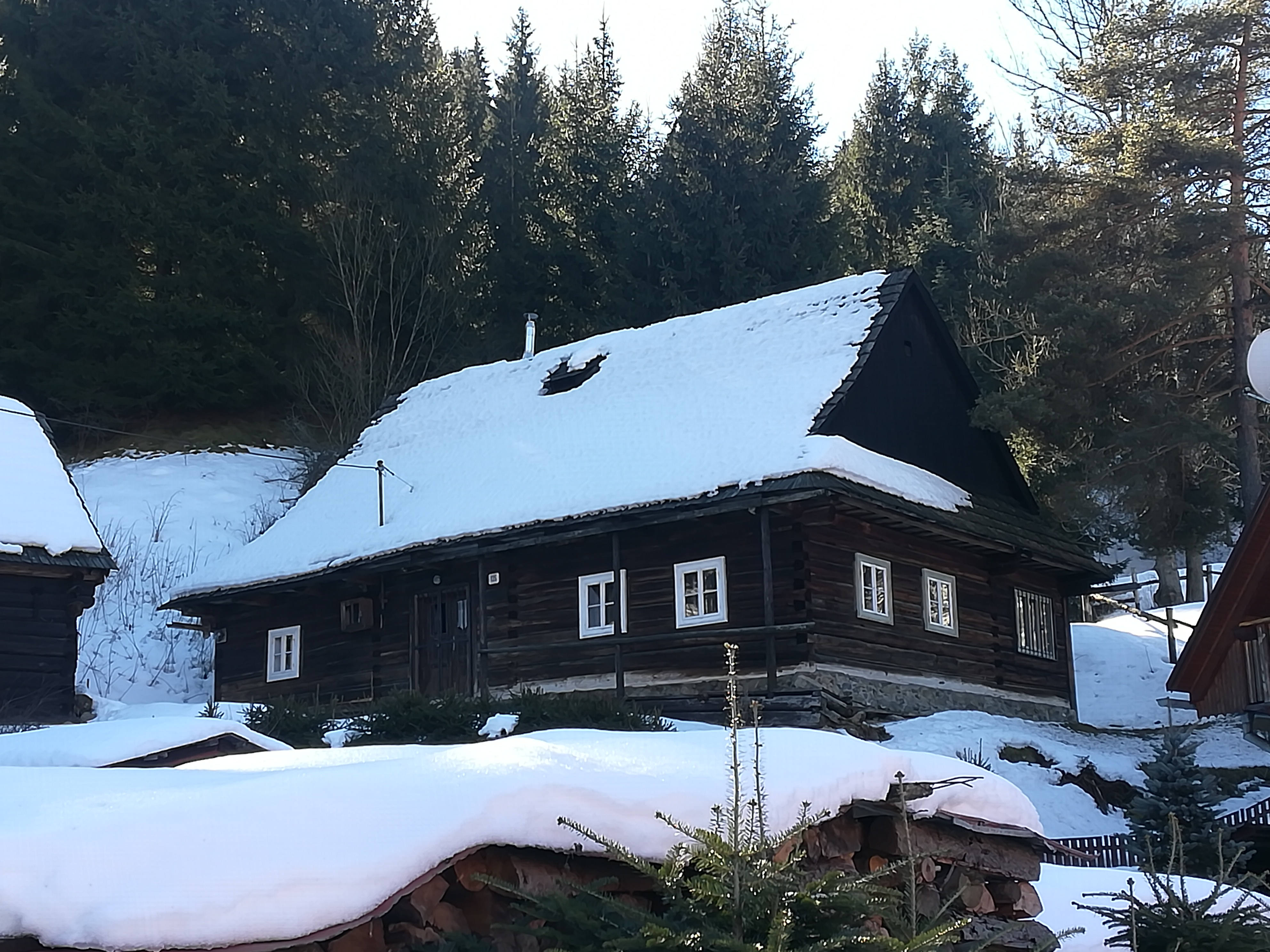 Ľudový dom, banícky dom v Nižnej Boci, okres Liptovský Mikuláš